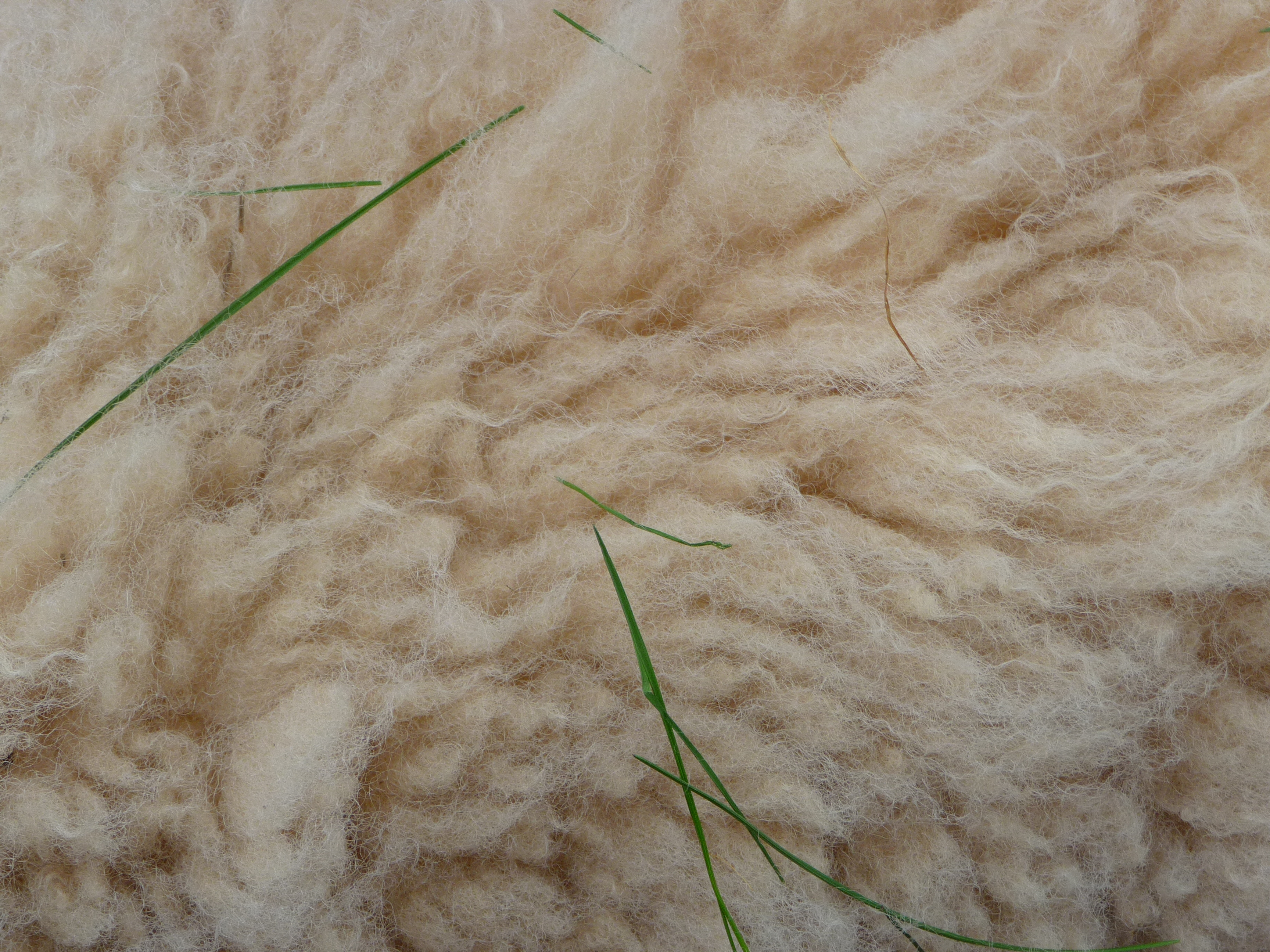 Wolle eines Ouessant-Schafs(Ushant), fotografiert im Heidelberger Stadtteil Ziegelhausen (Baden-Württemberg, Deutschland)